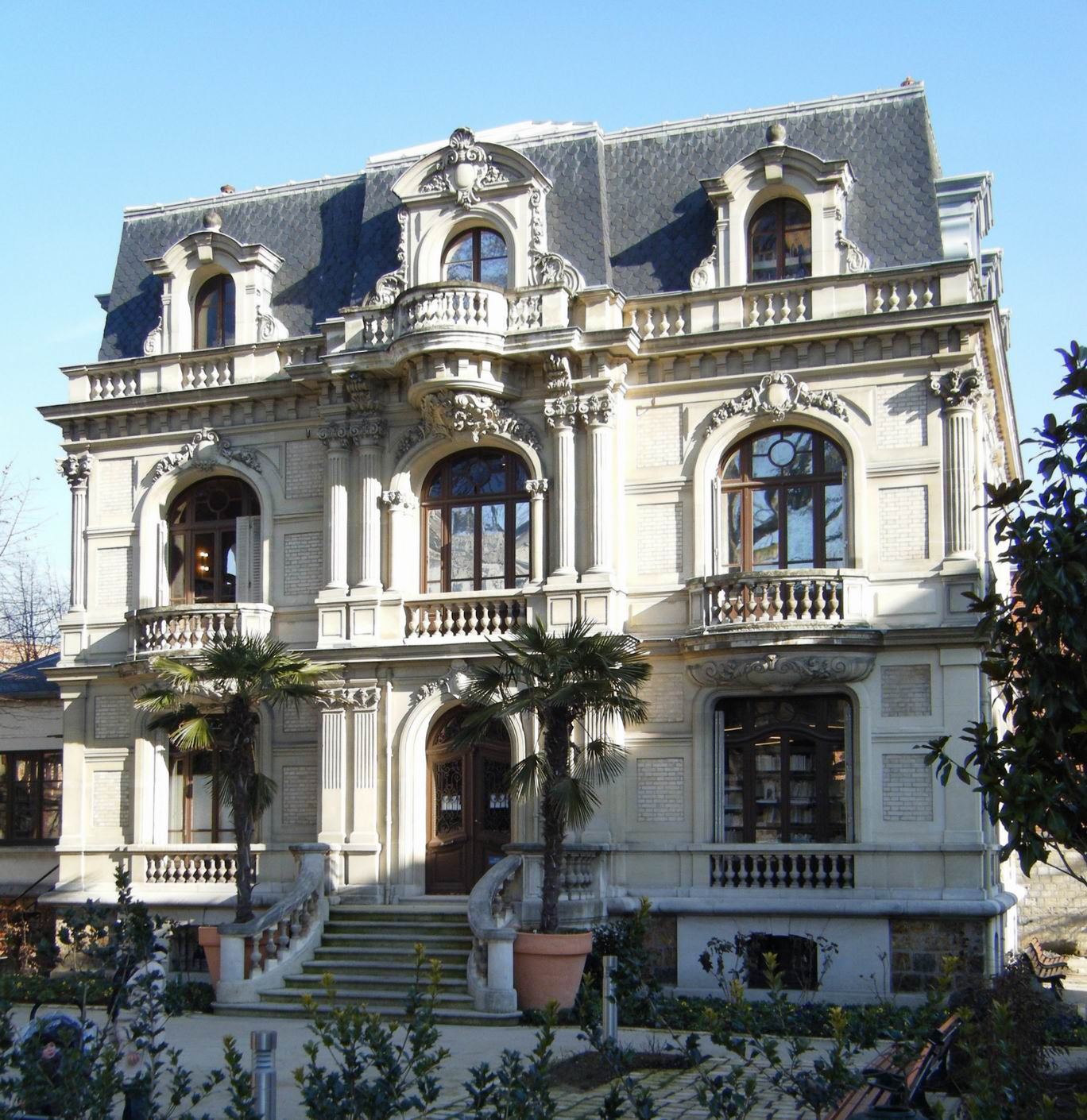 Cette Villa a été construite en 1899 par un rentier de Colombes, Gustave Aubry, sur un domaine ayant appartenu au marquis de L’Aigle et à la famille Sartoris.